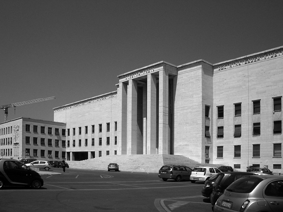 Marcello Piacentini: Rektoratsgebäude der Universität Rom, 1932-35.